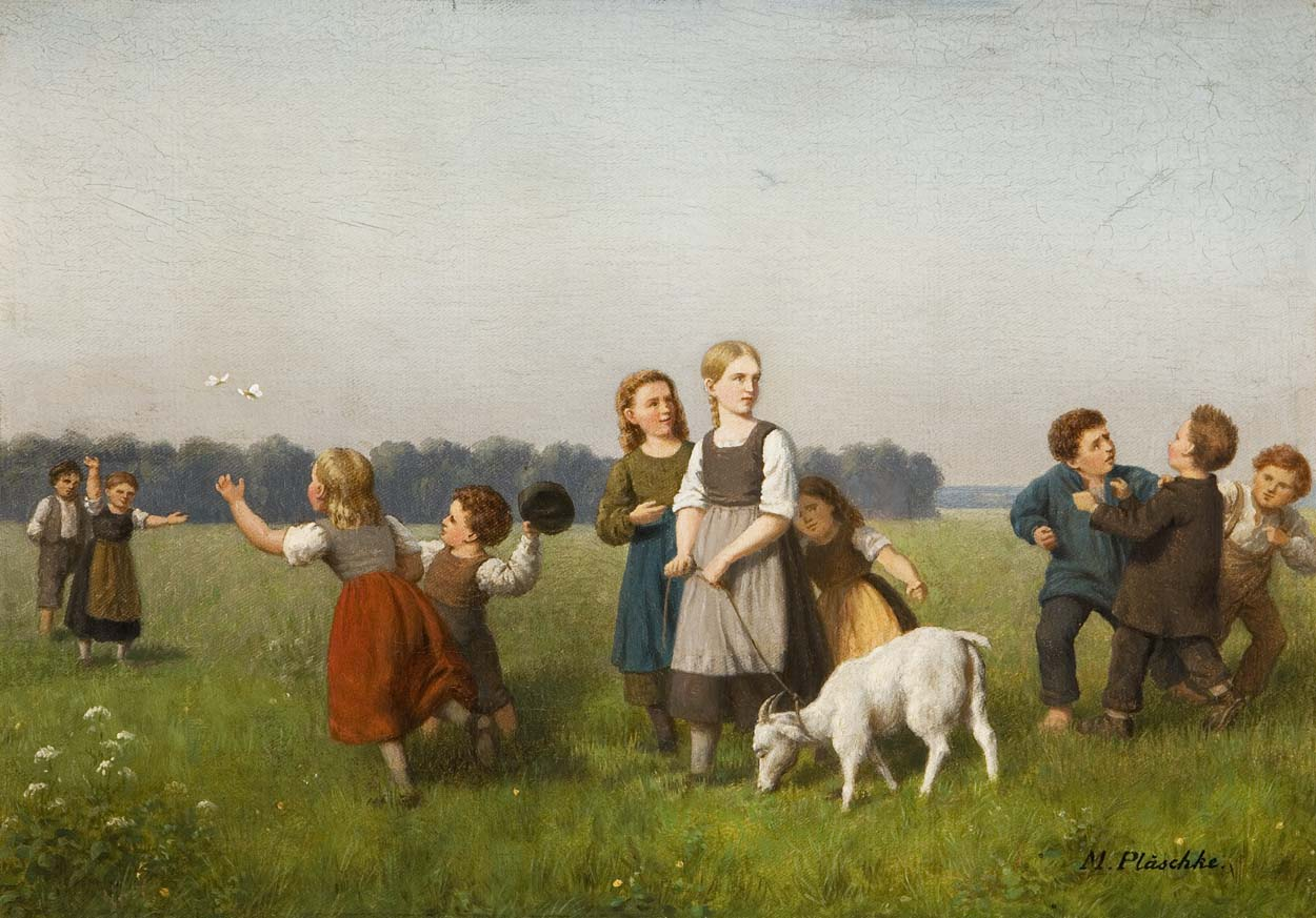 "Spielende Kinder mit Zicklein auf der Wiese", Öl auf Leinwand, signiert, 25 x 35 cm